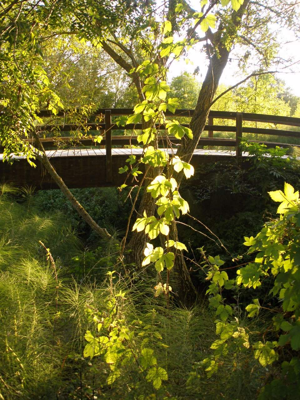 Humedales de Salburúa, Vitoria-Gasteiz